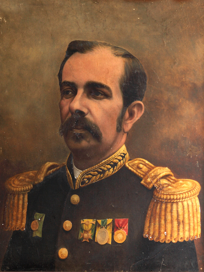 Floriano Peixoto, segundo presidente do Brasil (1891-1894).